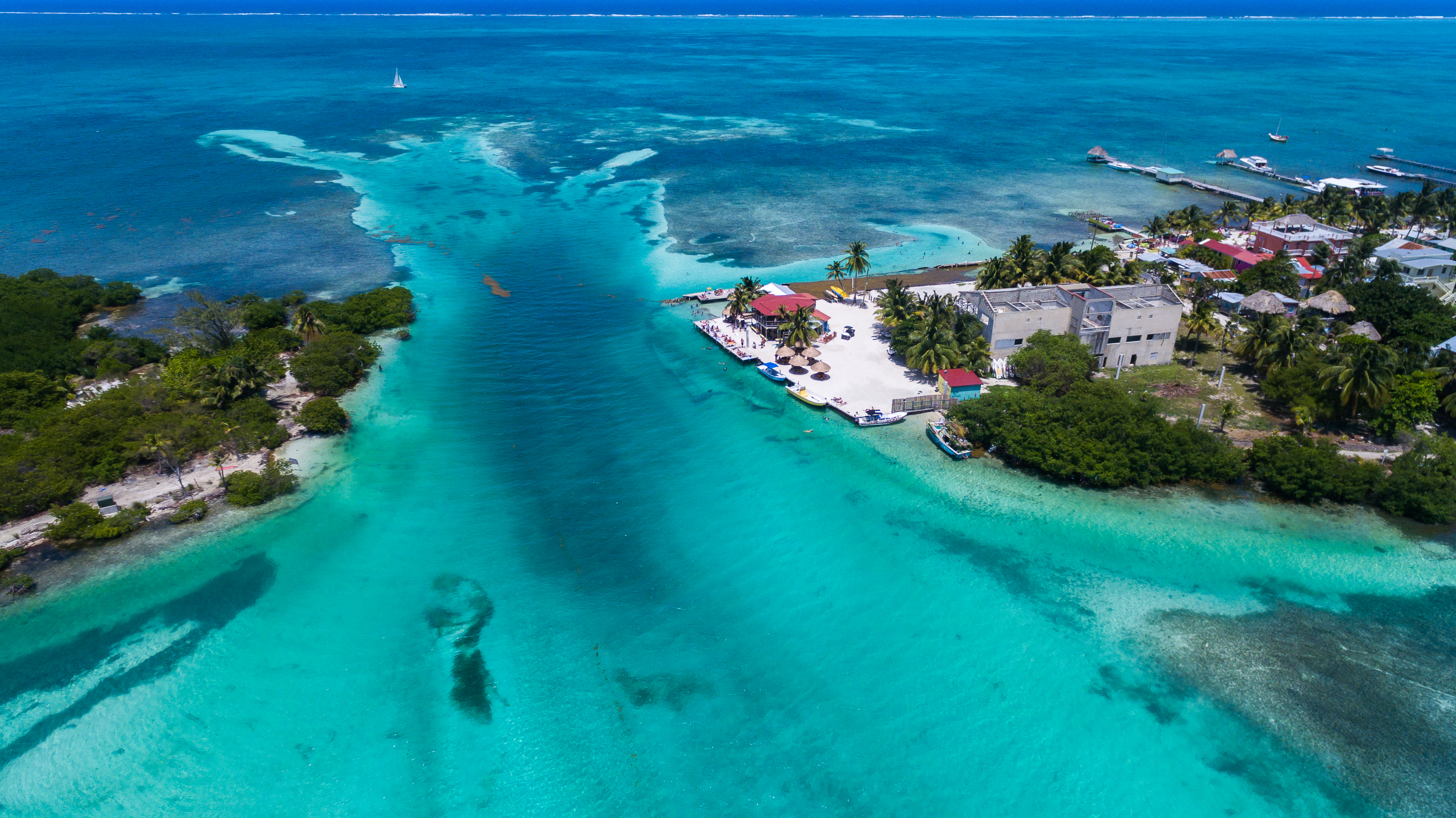 beautiful island in Belize, Caye Caulker